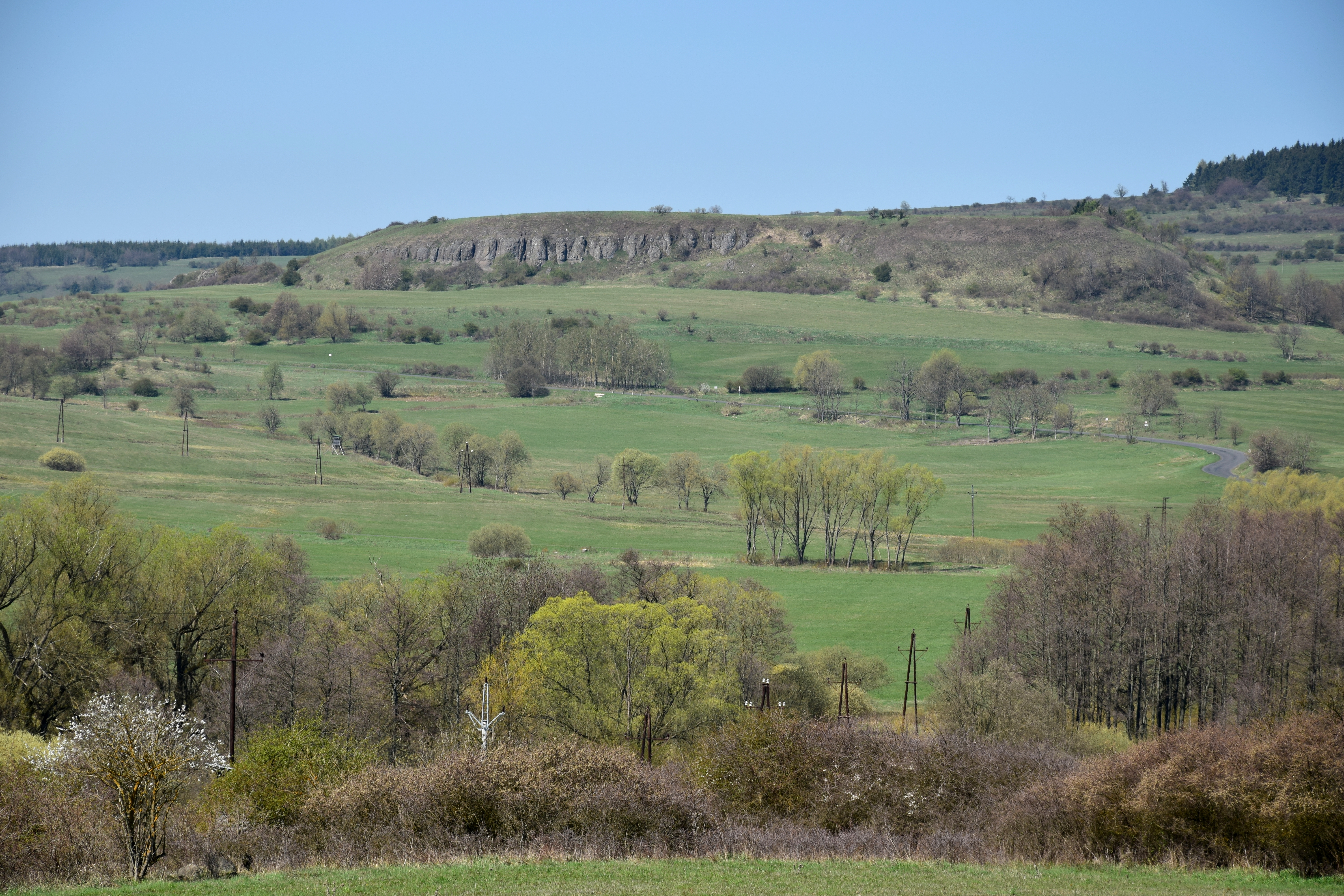 Doupovské hory na jižním okraji Vojenského újezdu Hradiště mezi Javornou a Radošovem